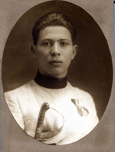 Petschauer Attila vívó olimpiai bajnok